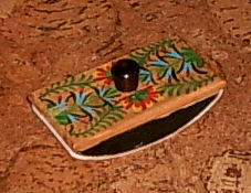 Alte Löschwiege, selbst fotografiert, März 2006